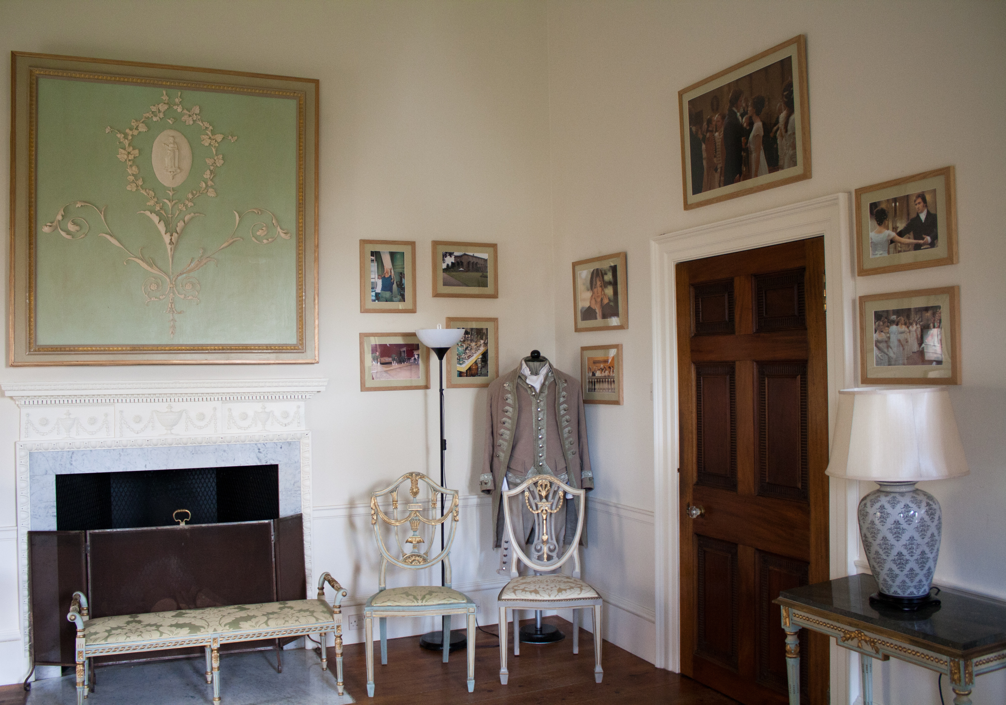 Pride & Prejudice Exhibit